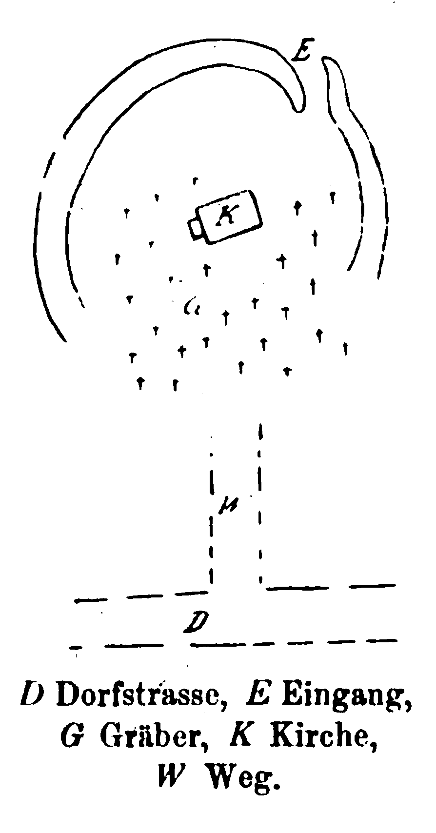 Zeichnung des slawischen Burgwalls ("Schwedenschanze") in Buckow, bei Rietz-Neuendorf, Brandenburg, Germany